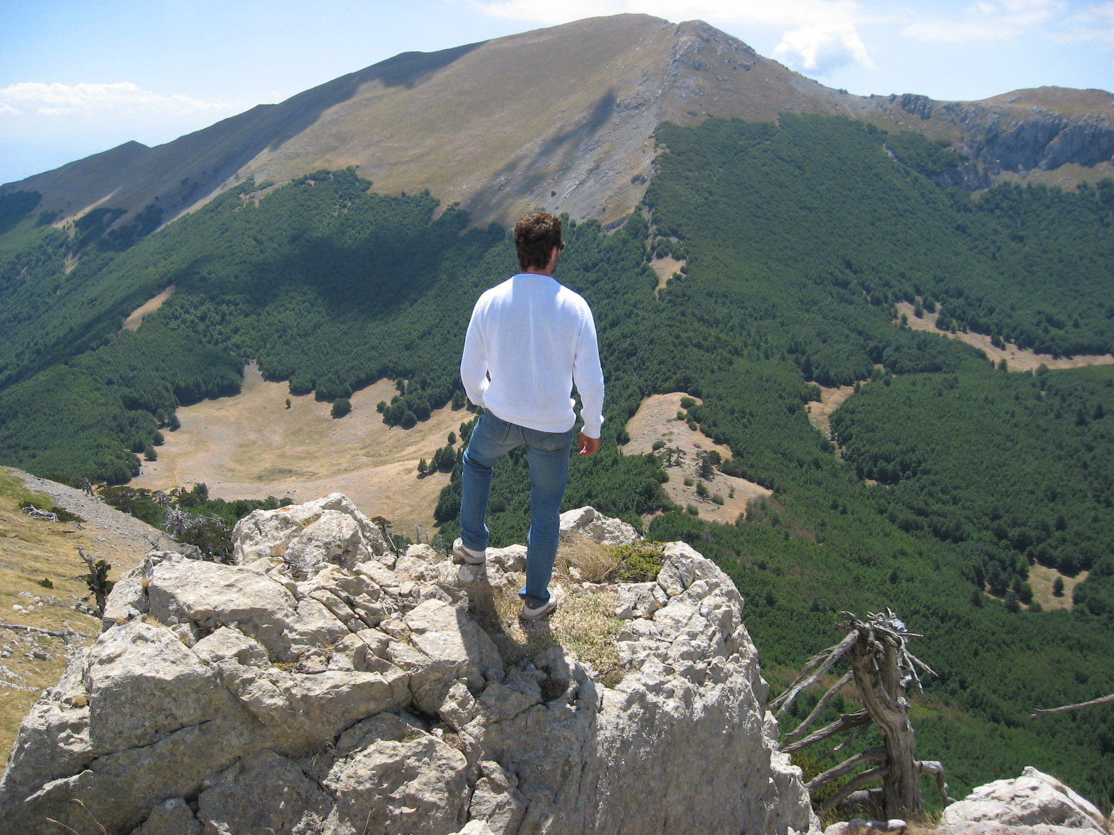 Il versante settentrionale di serra Dolcedorme (dalla cima meridionale di Serra delle Ciavole)